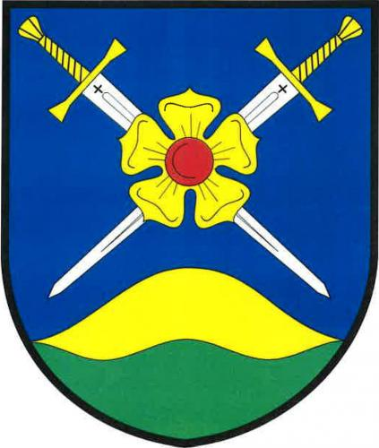 Pleše znak